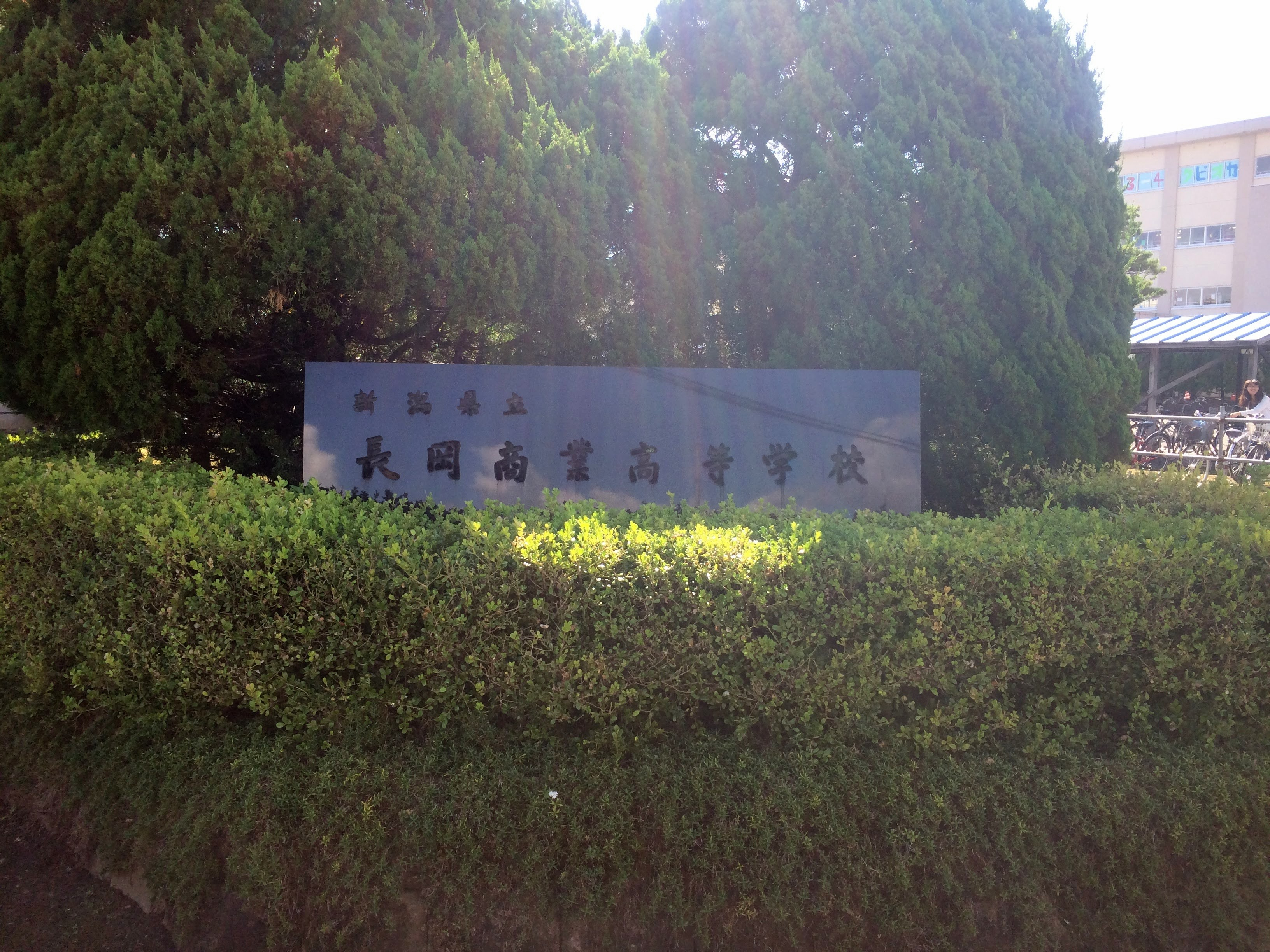 長岡商業高校・学校表示